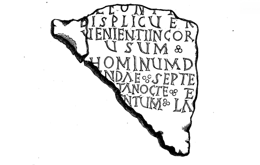 Site archéologique de la villa gallo-romaine de Loupiac-33, fouilles de 1868 ː inscription funéraire ?.